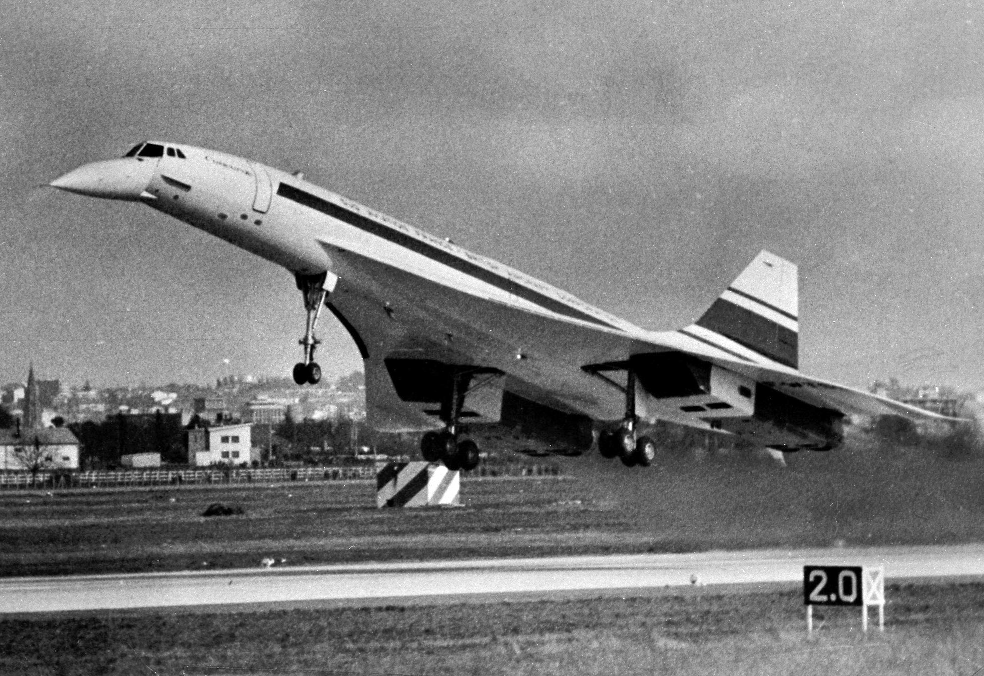 Pistes de Blagnac. 2 mars 1969. Gros plan d'une photo du Concorde au décollage ou à l'atterrissage scotchée sur un support. Cliché pris lors du 1er vol d'essai du Concorde.